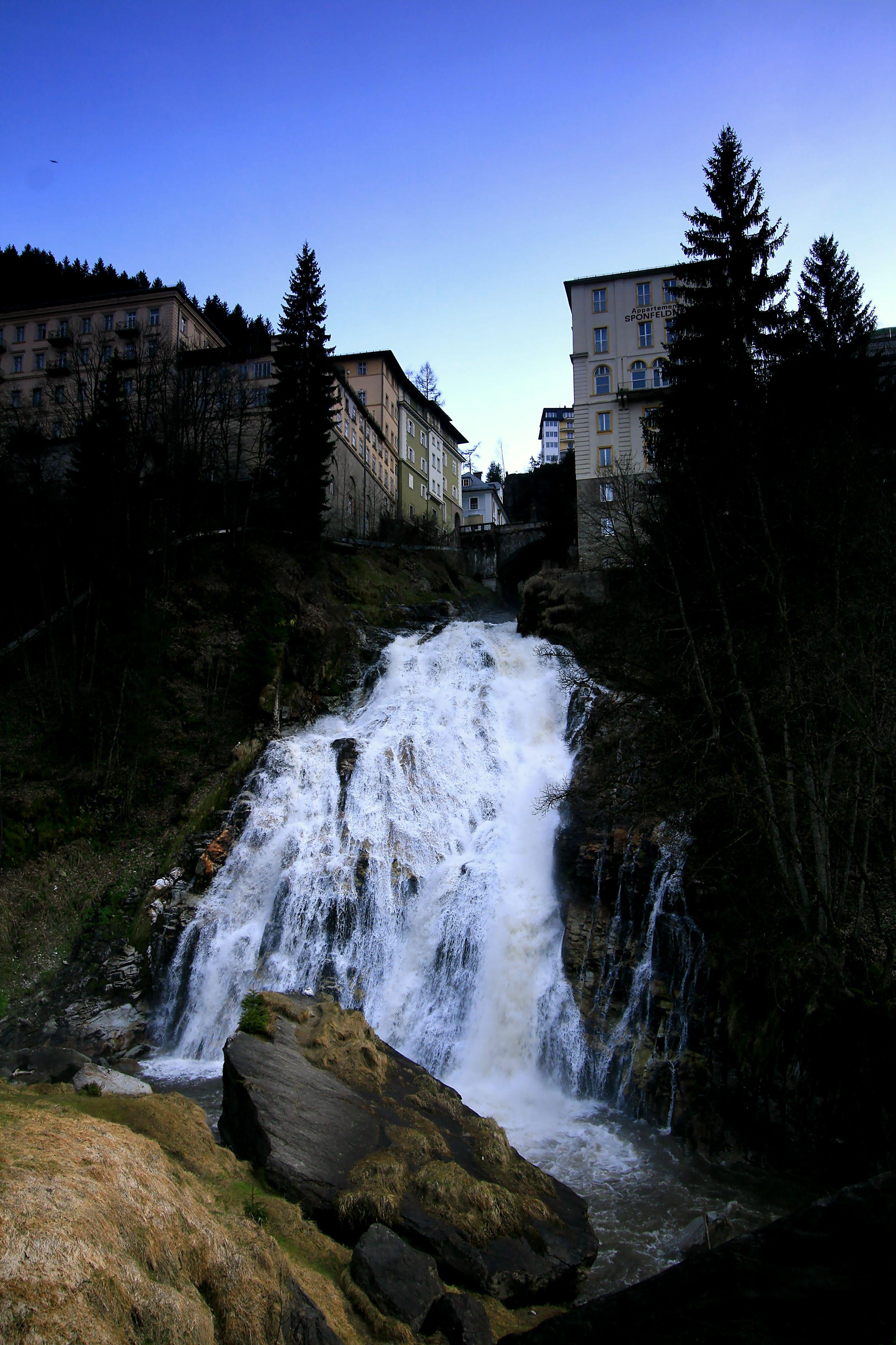 Waterfall